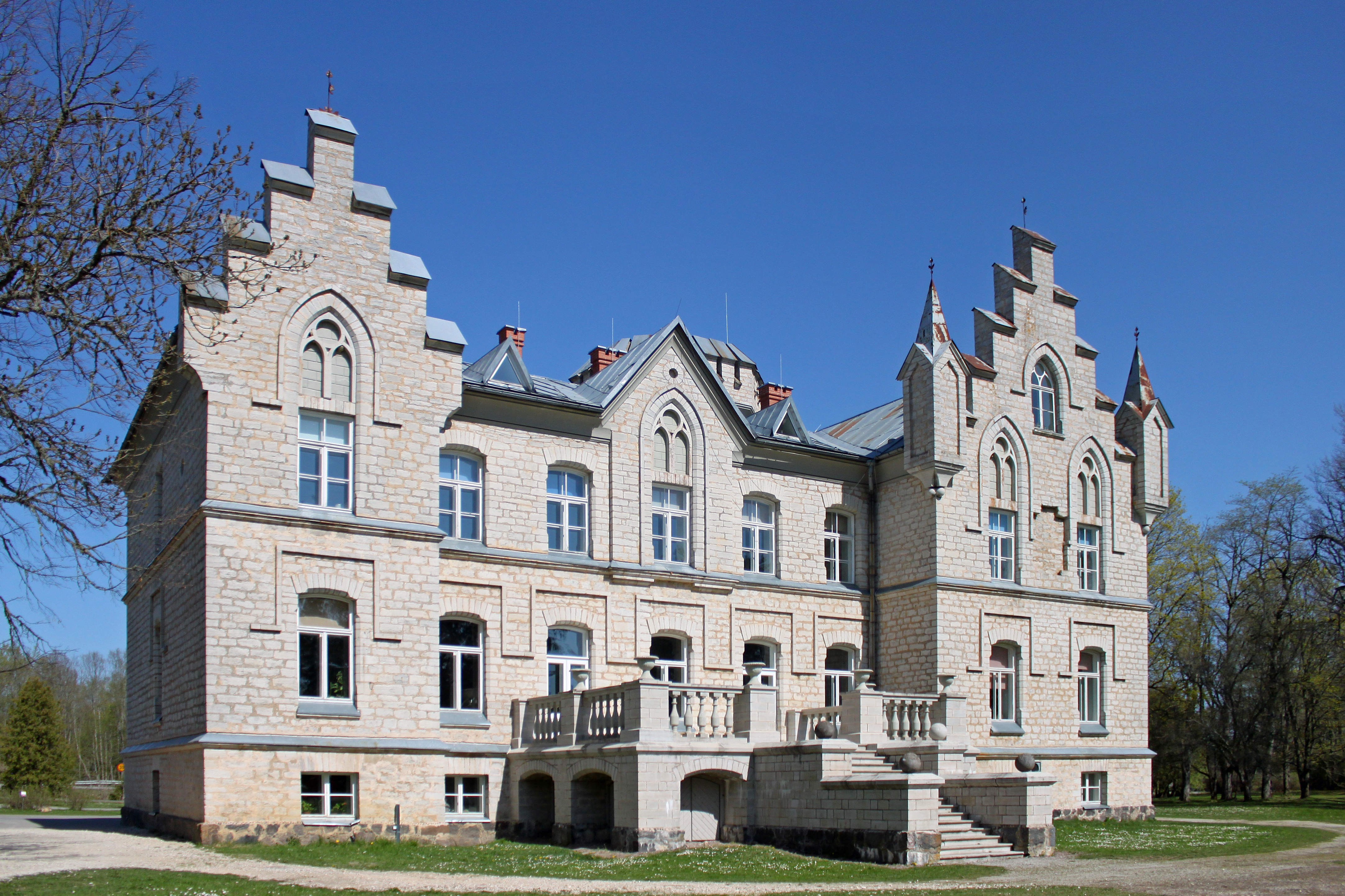 Господский дом мызы Вазалемма (Основная школа Вазалемма) в 2019 году. Задний фасад